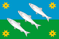 Флаг посёлка Муезерский, Карелия